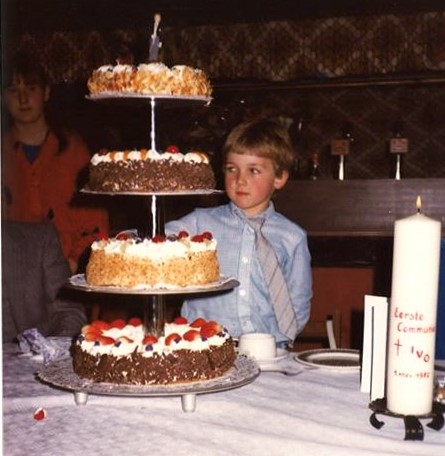 Foto van mijn zoon op zijn eerste communie 1982.